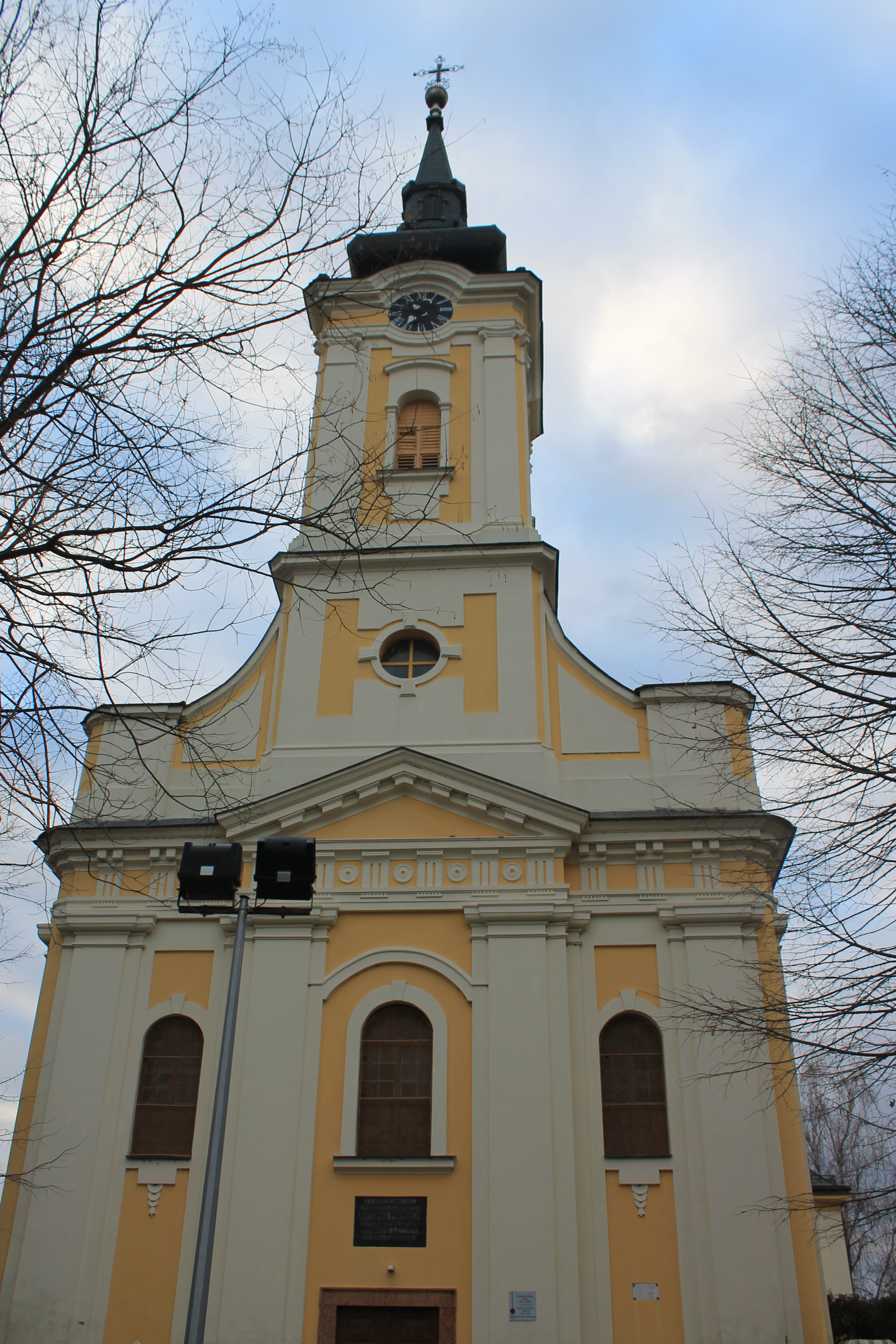 Rimokatolička crkva, Sremska Mitrovica